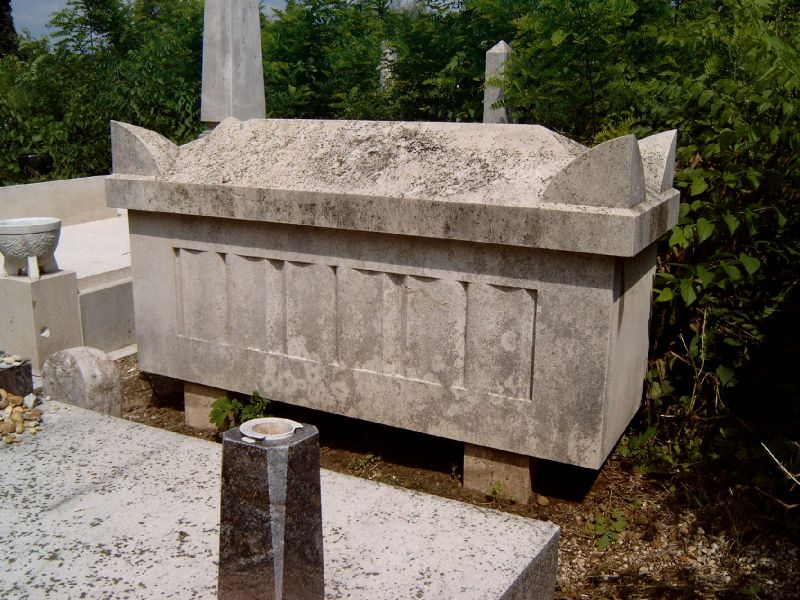 Kármán Mór (Szeged, 1843. december 25. – Budapest, 1915. október 14.) pedagógus, művelődéspolitikus. Kármán Tódor apjának síremléke. Kozma utcai izraelita temető: 5A-18-1